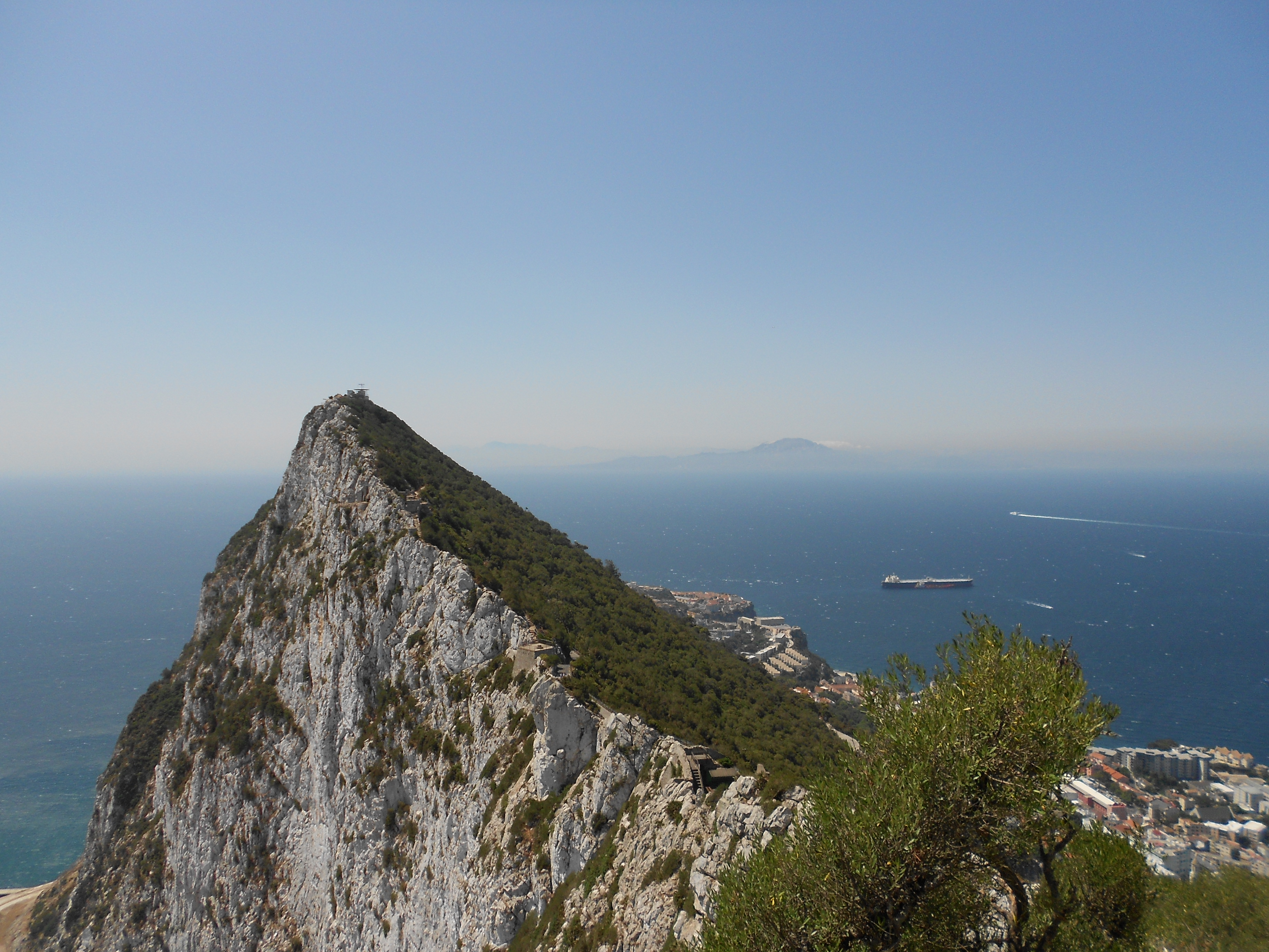 Der Südgipfel des Felsens of Gibraltar, im Hintergrund die marokkanische Küste